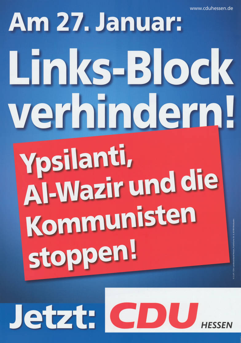 Am 27. Januar: Links-Block verhindern! Ypsilanti, Al-Wazir und die Kommunisten stoppen! Jetzt: CDU Hessen Plakatart: Textplakat Allgemein Auftraggeber: V.i.S.d.P.: CDU-Landesverband Hessen, Wiesbaden Objekt-Signatur: 10-007 : 1907 Bestand: Landtagswahlplakate Hessen (10-007) GliederungBestand10-18: Landtagswahlplakate Hessen (10-007) » CDU Lizenz: KAS/ACDP 10-007 : 1907 CC-BY-SA 3.0 DE